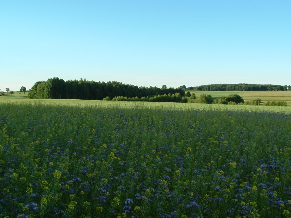 Las w Zielonej Górze (pomorskie)